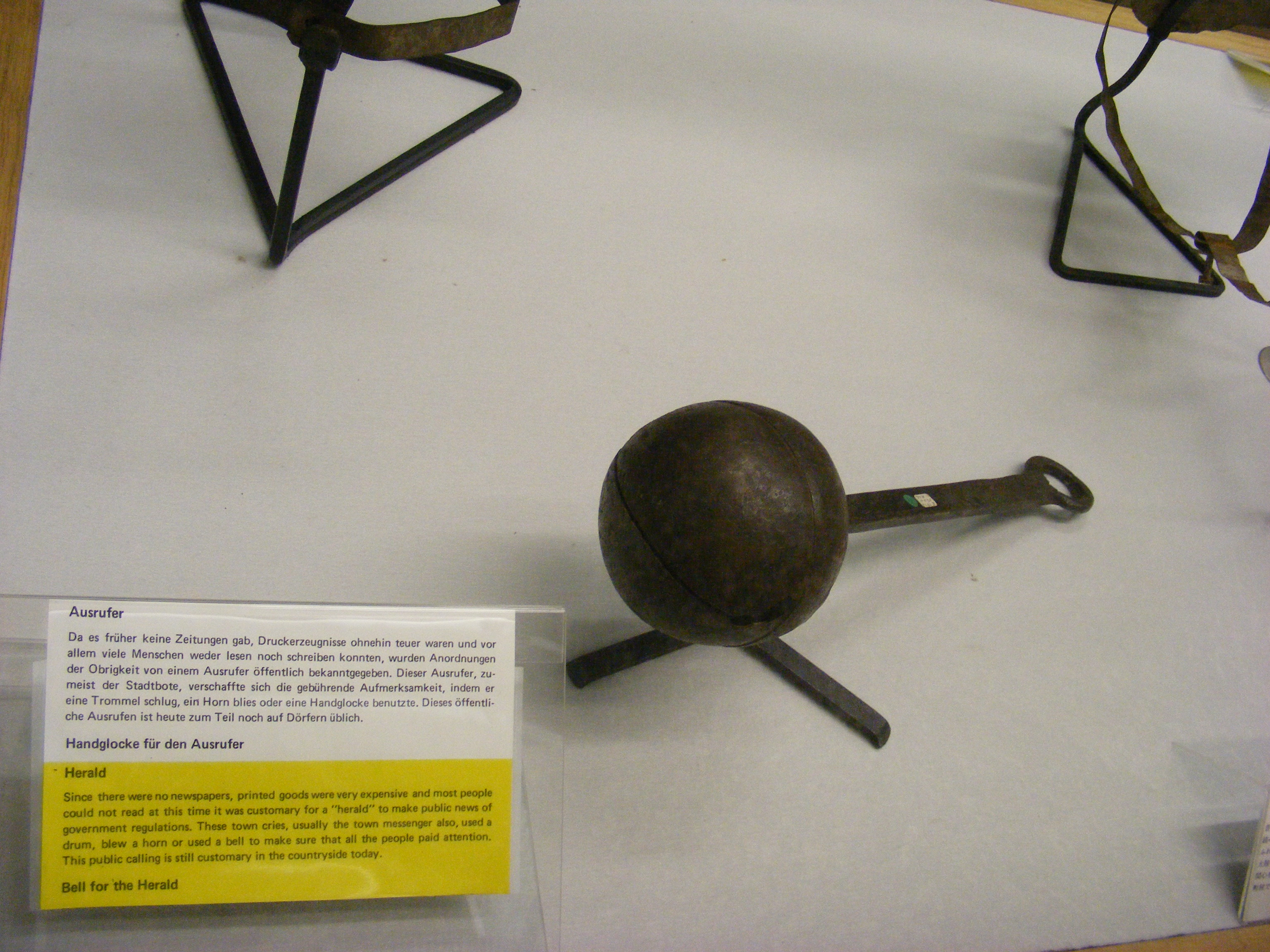 Handglocke für Ausrufer (Exponat im Mittelalterlichen Kriminalmuseum Rothenburg ob der Tauber) -- keine Zeit- und Ortsangabe an/in der Vitrine.